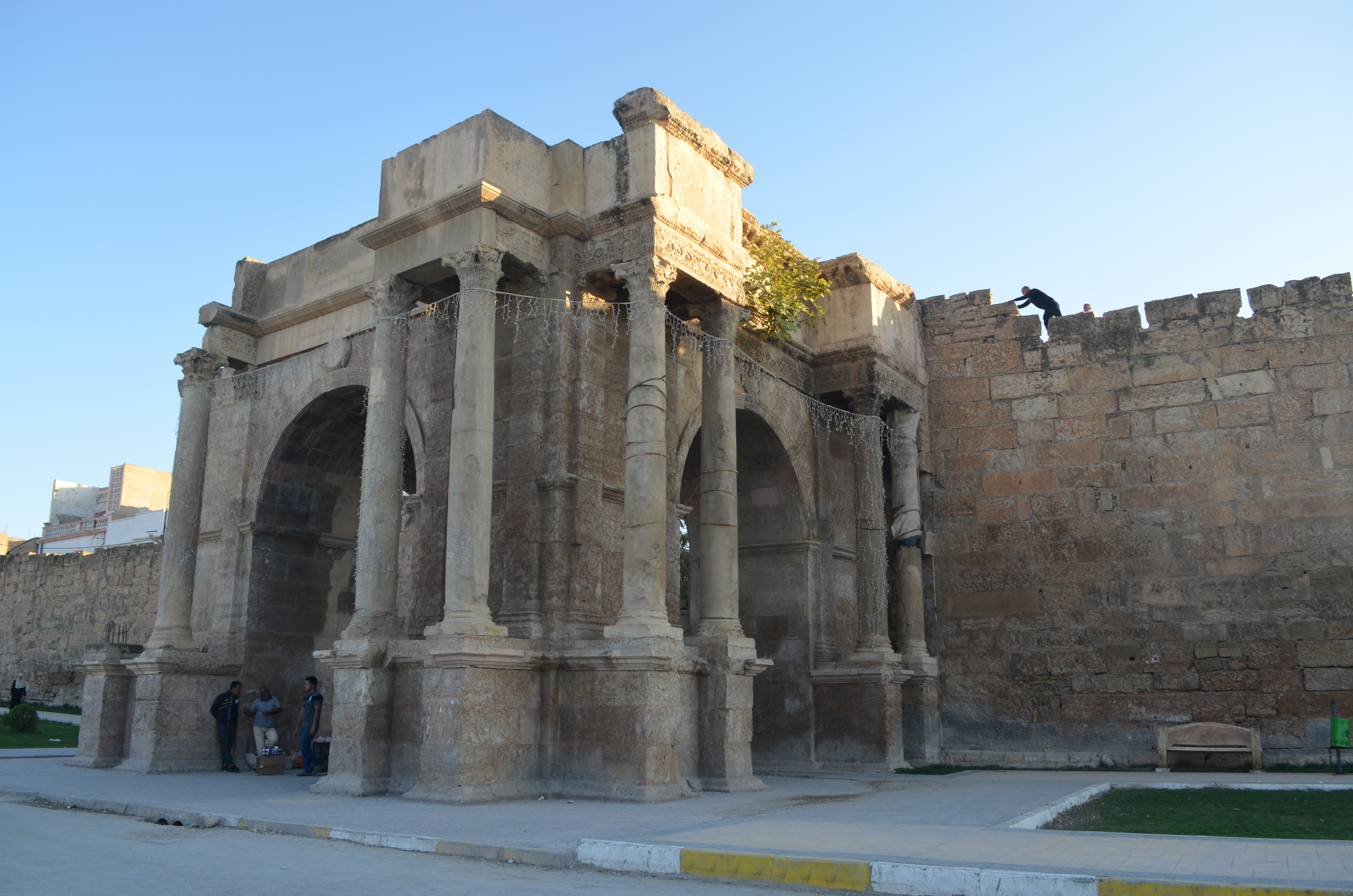 قوس النصر كركلا في مدينة تبسة الجزائرية